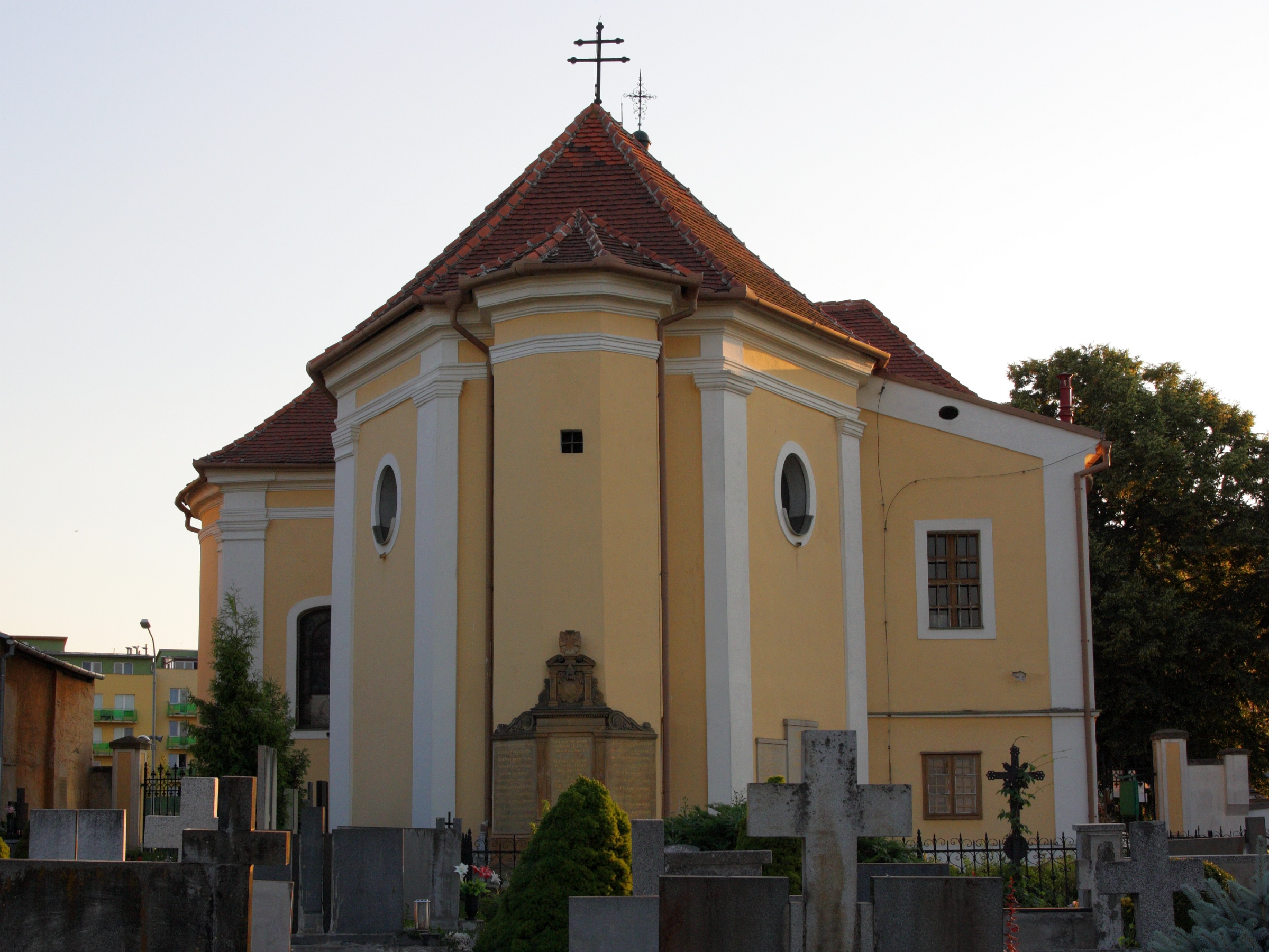 Rajhrad - kostel Povýšení svatého Kříže, presbytář.